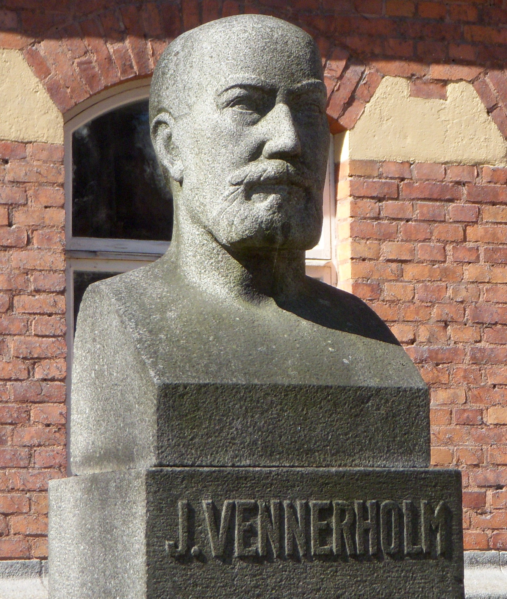 John Vennerholm (1858-1931), svensk veterinär och högskolelärare, 1915 rektor för Veterinärhögskolan